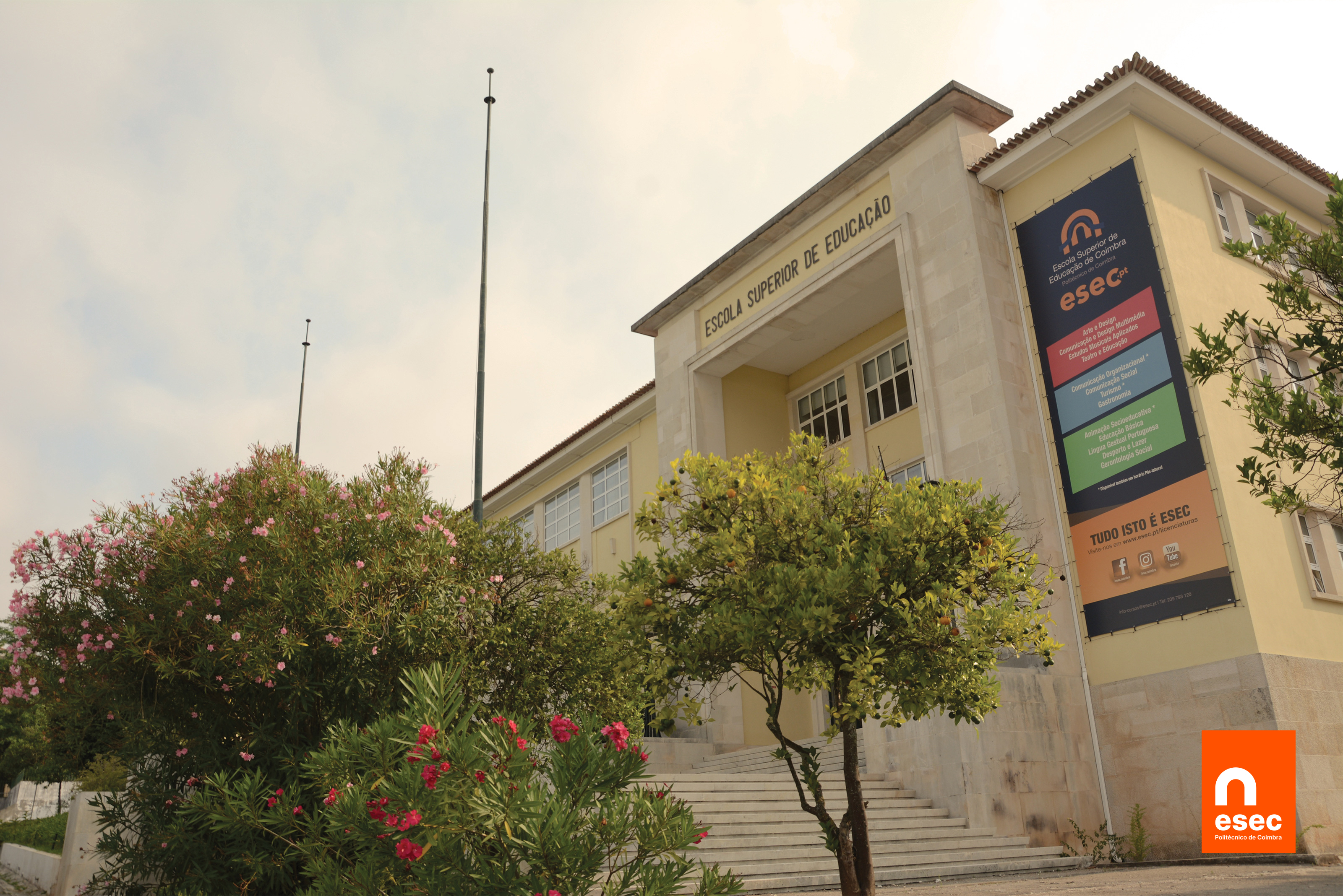 Fachada da ESEC coimbra